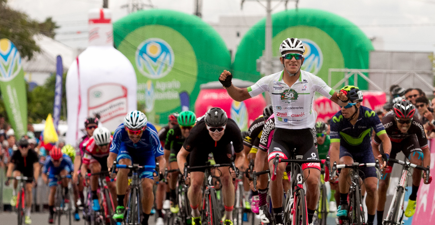 Sprint final Etapa 11 Vuelta a Colombia 2017